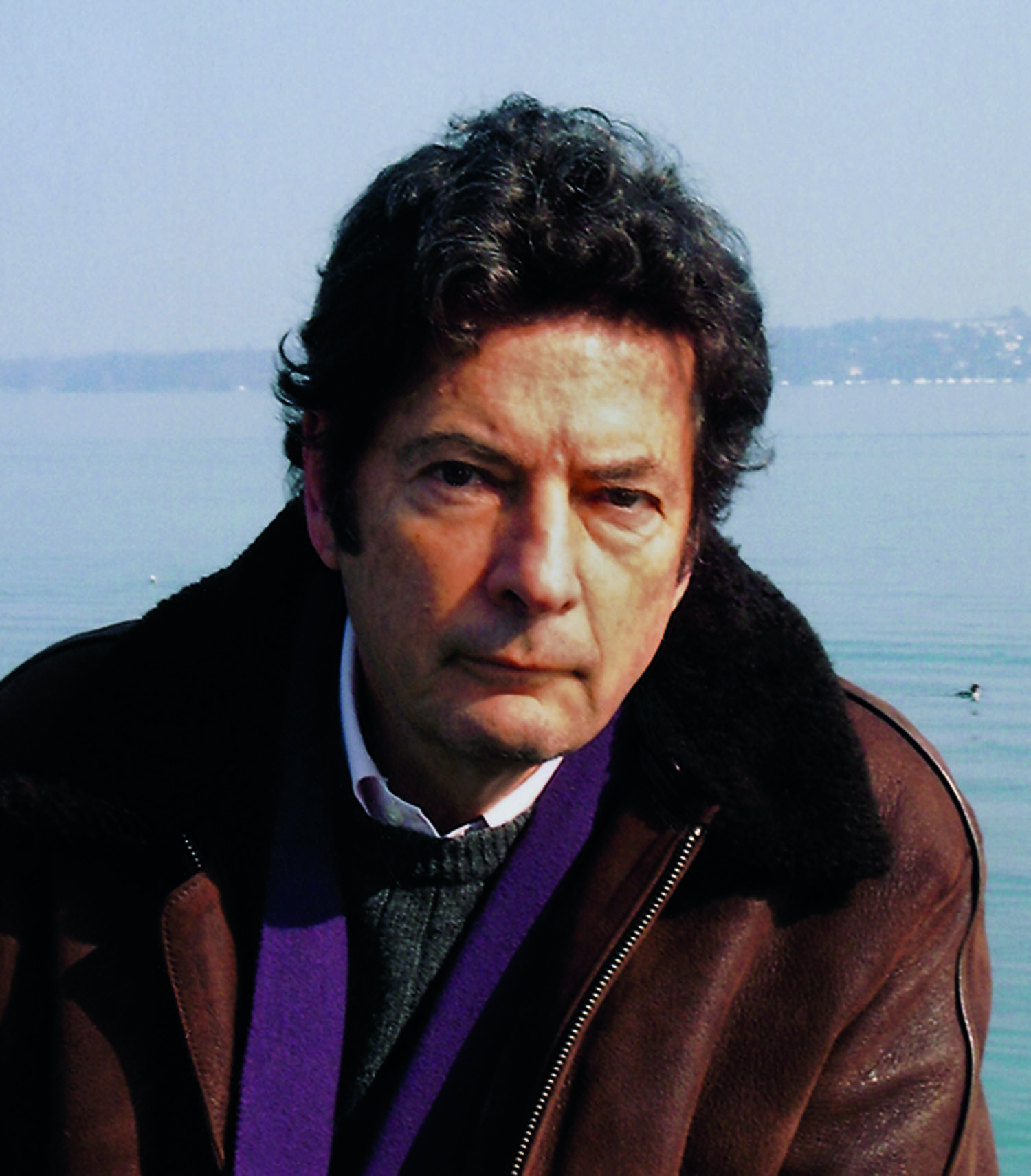 Κωνσταντίνος Στάικος